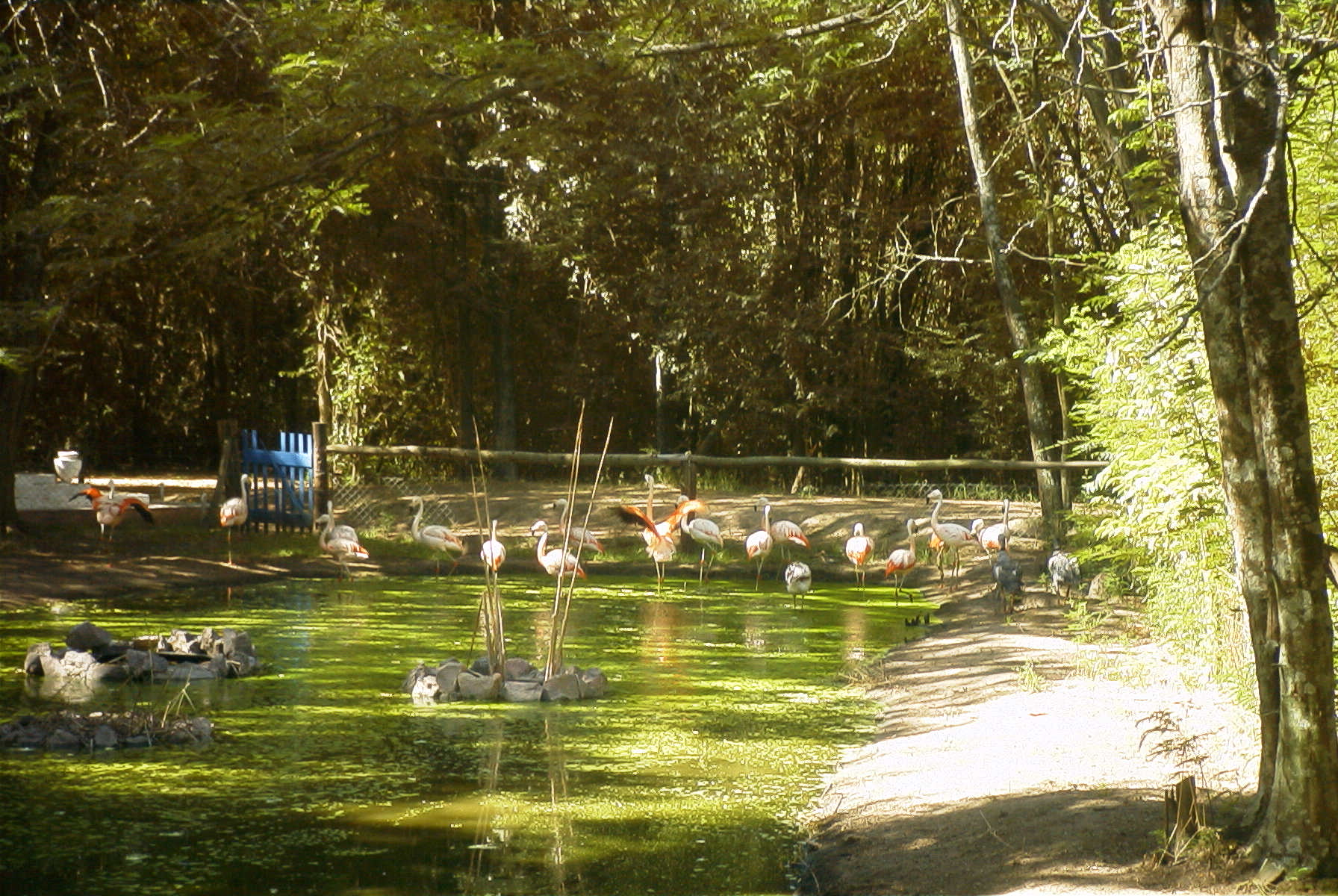 Zoo de América Zoológico Place: América, Rivadavia, Buenos Aires, Argentina Photographer: Usuario:Barcex